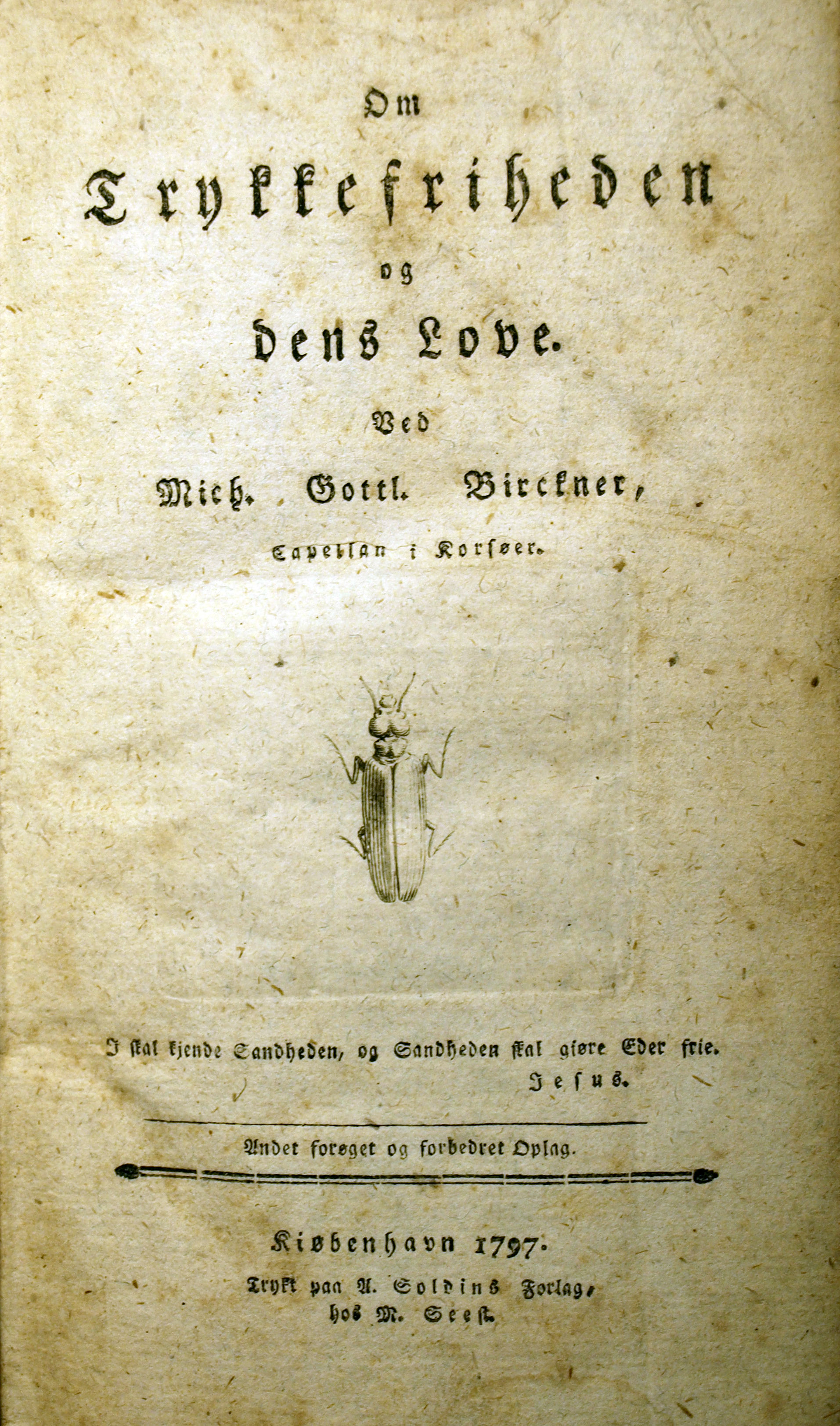 Titelbladet til den anden og forøgede udgave af M.G. Birckners "Om Trykkefriheden og dens Love." fra 1797.